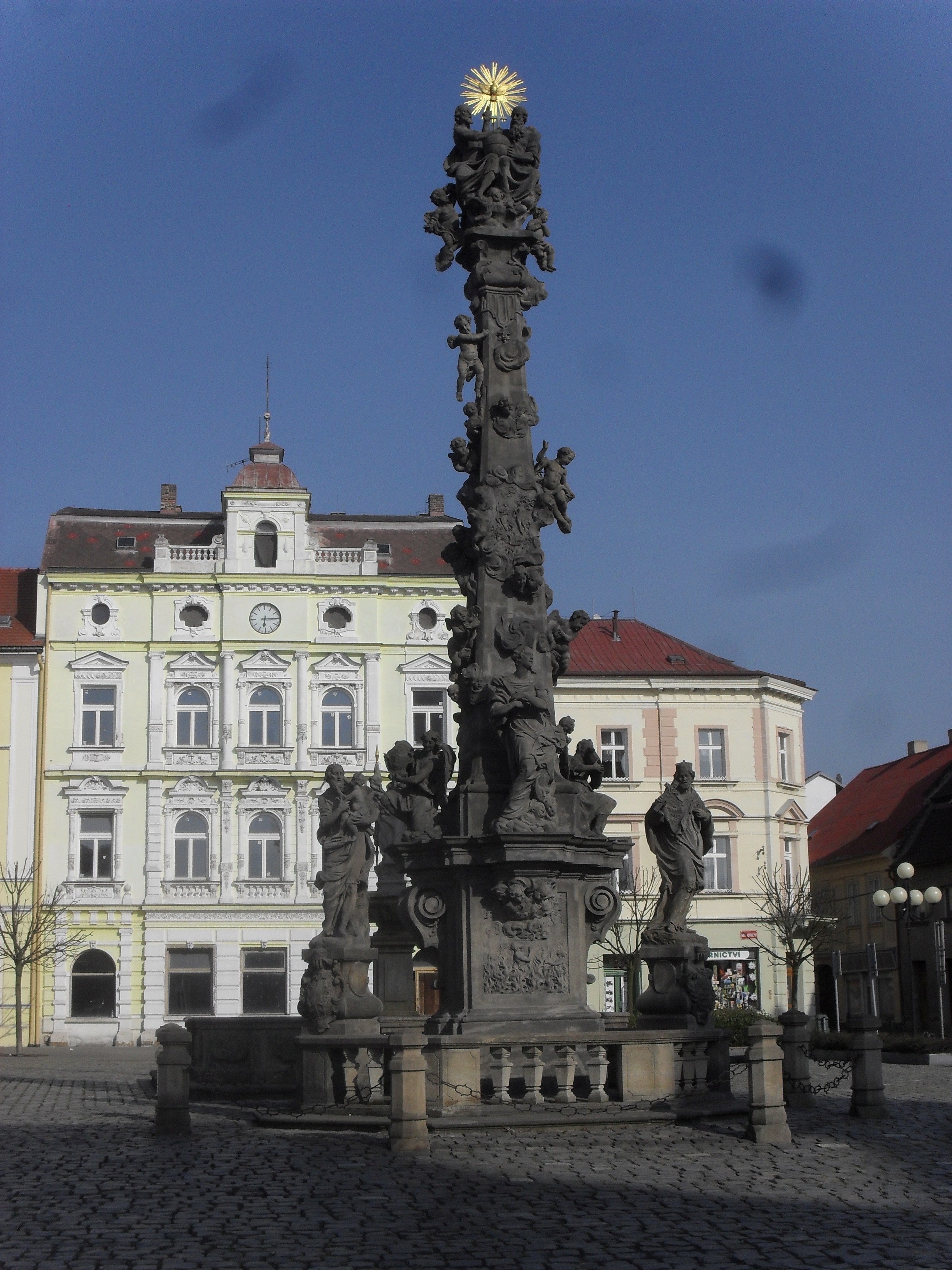 Duchcov, náměstí Republiky, morový sloup, domy nám. Republiky 13/2, 12/3.